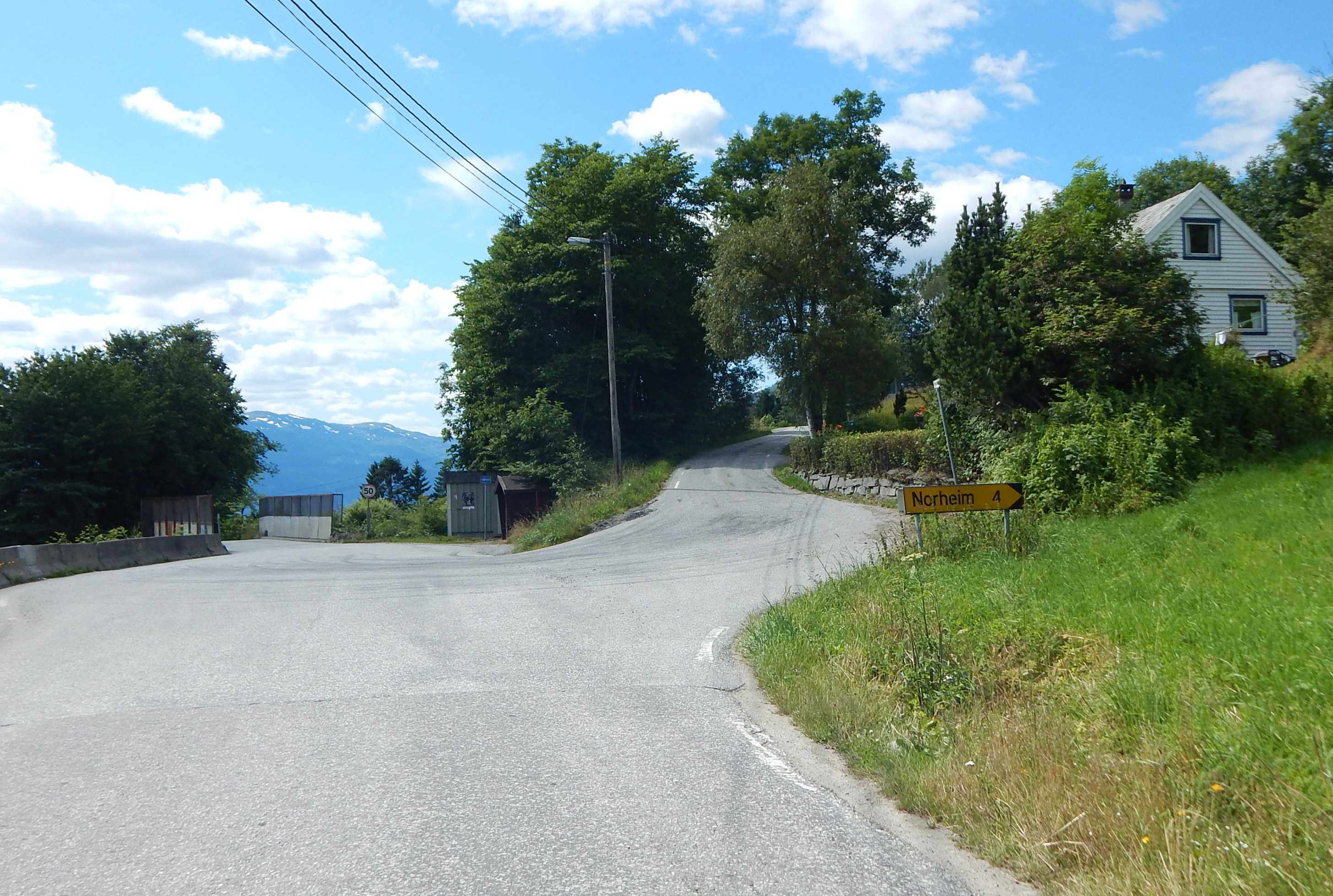 Kytesvegen (fylkesvei 308) tar av mot høyre fra Raundalsvegen (fylkesvei 307).